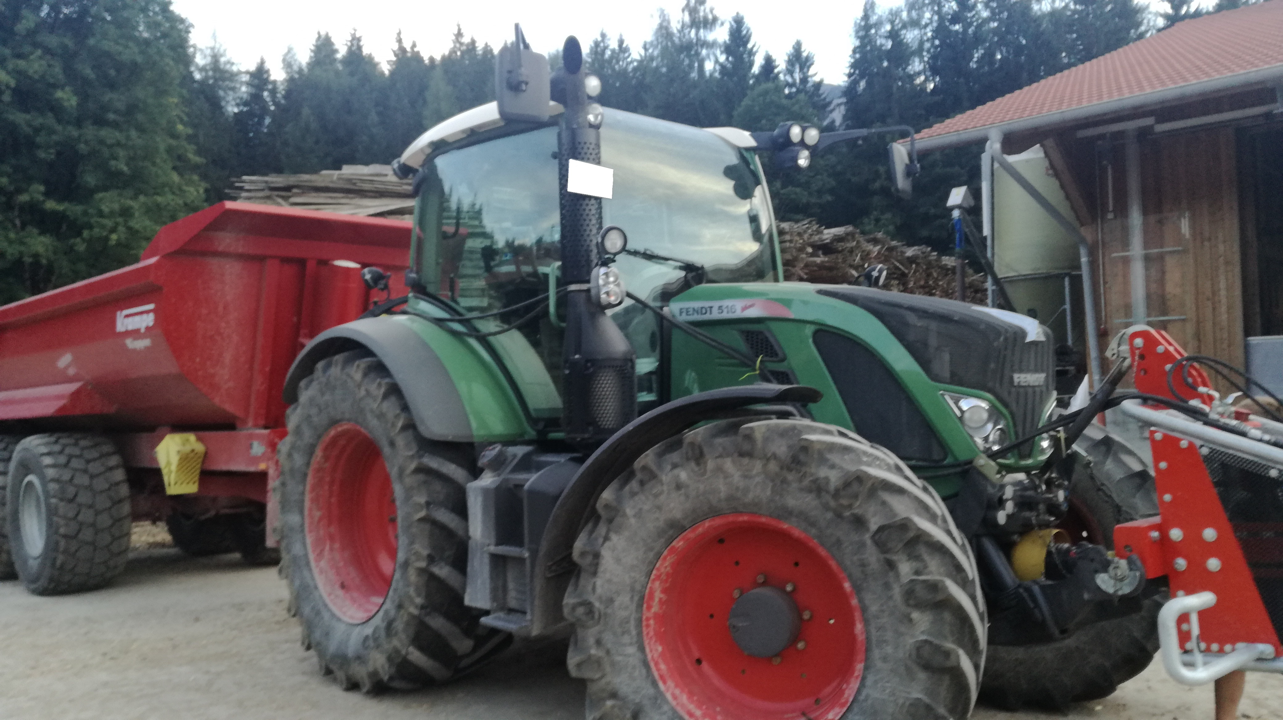 Moderner Traktor Fendt 516 Vario mit Krampe Kippmulde